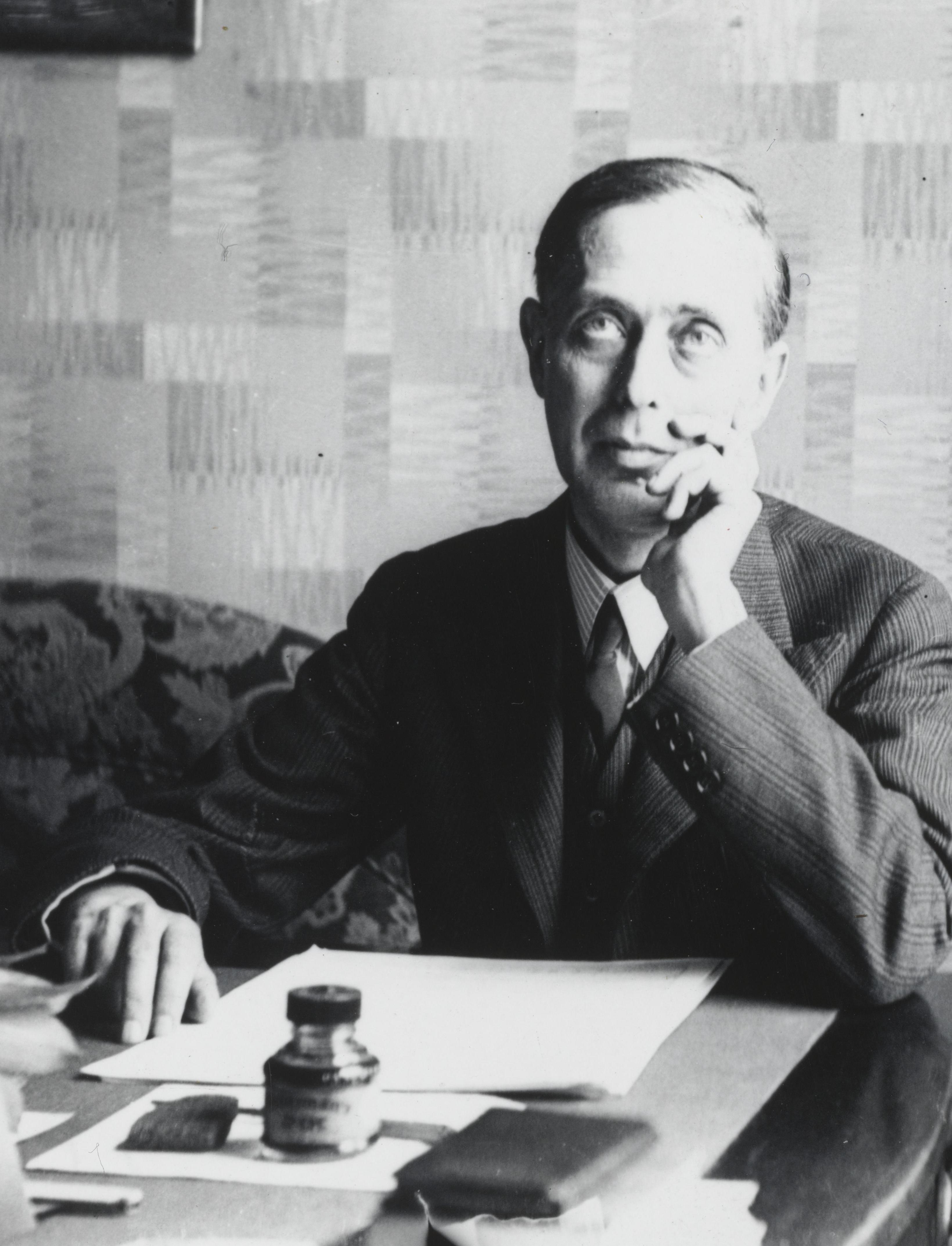 Bildet er hentet fra Nasjonalbibliotekets bildesamling Depicted person: Valen, Fartein